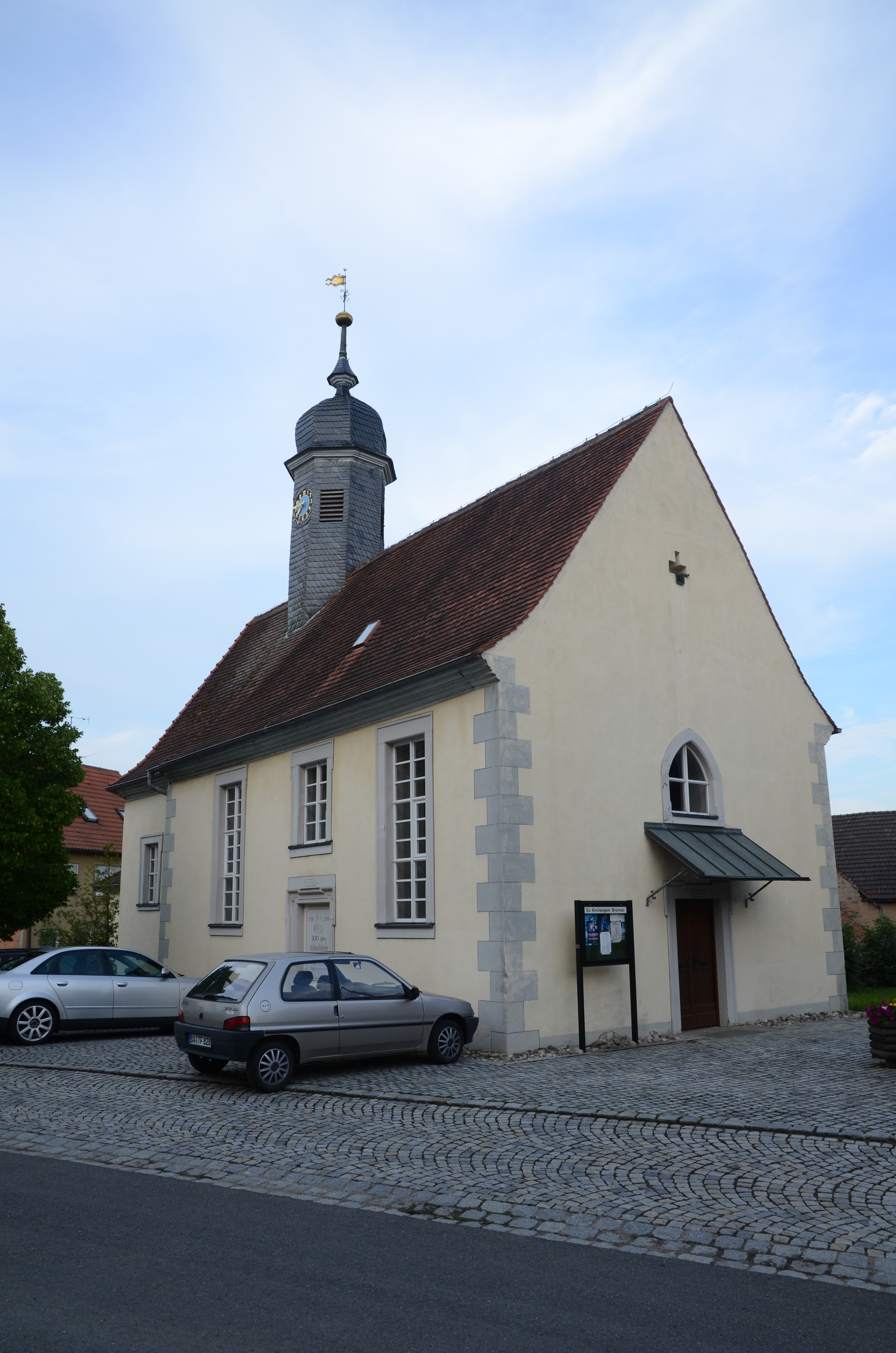 evang.-luth. Kirche in Brünnau